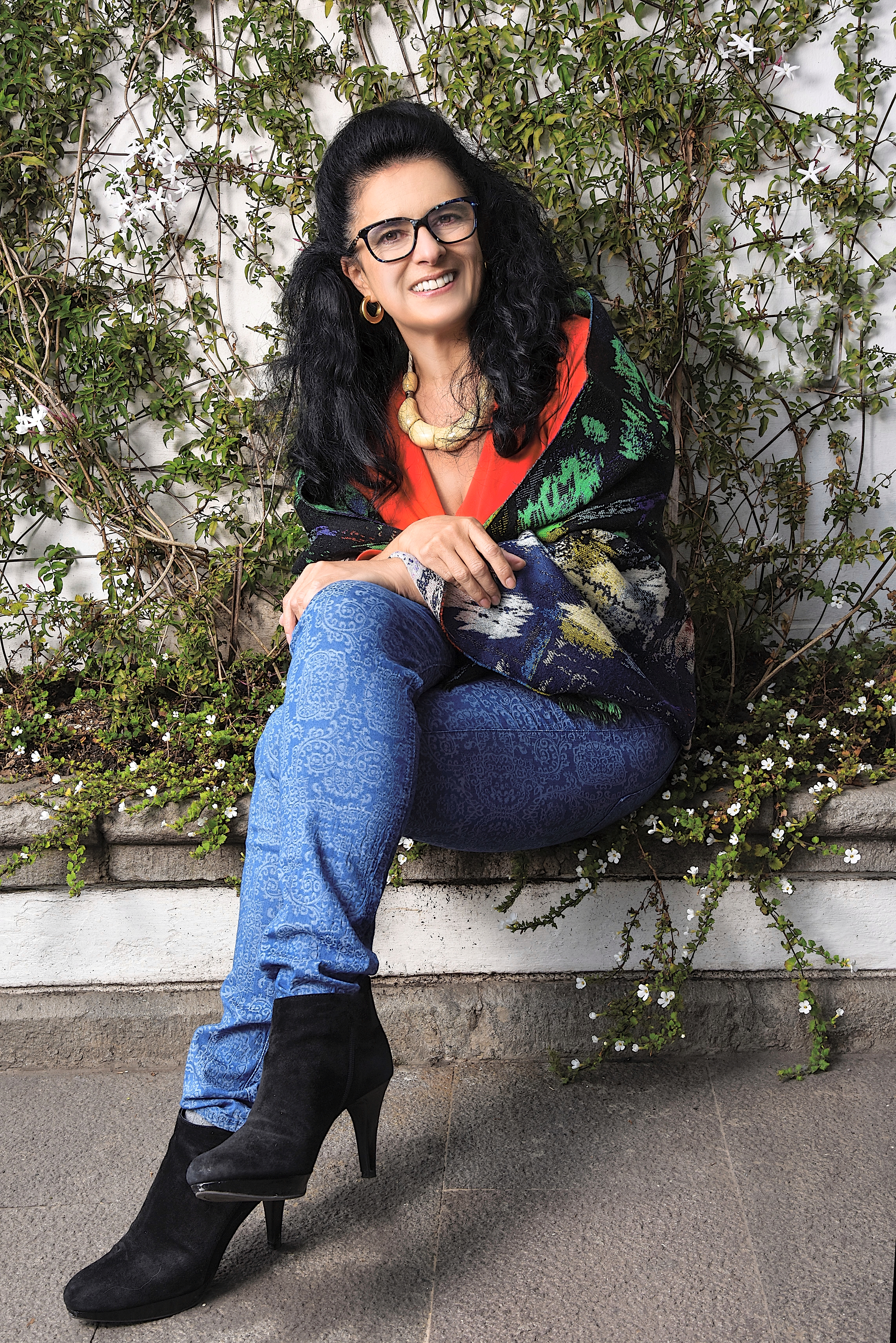 Viviana Cordero Espinosa- Ecuatoriana,Escritora, Directora teatral y de Cine